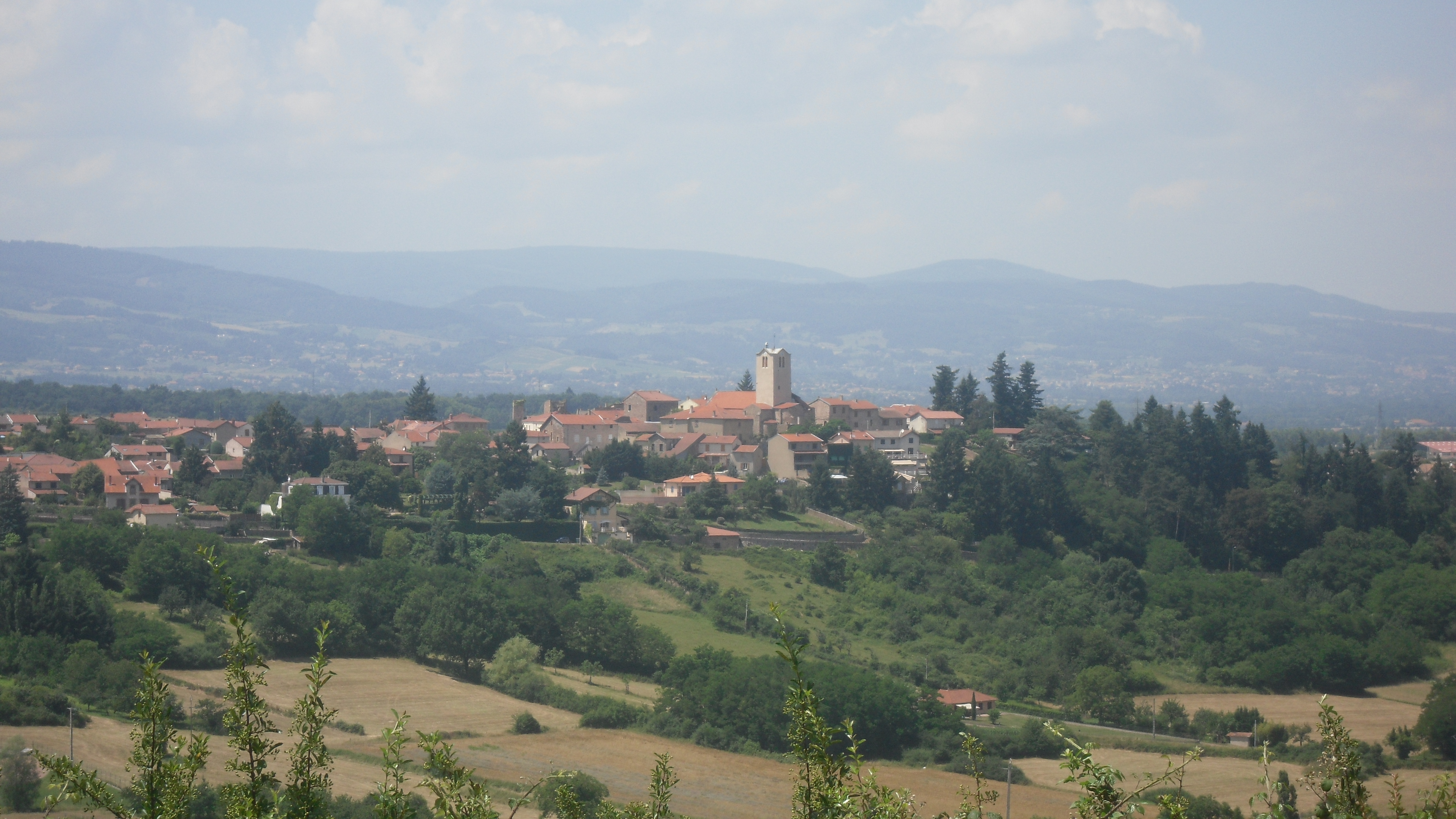 Vue sur le bourg de Villerest.